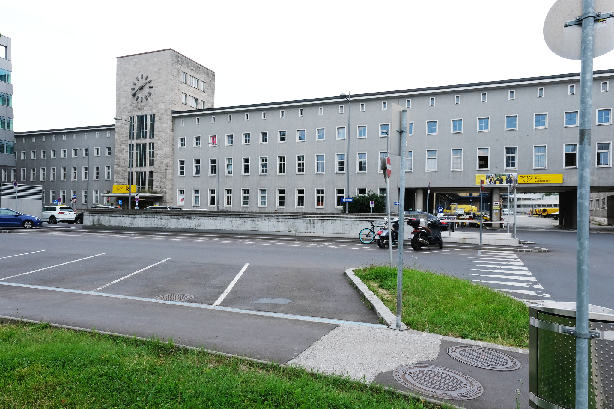 Bahnhofpostamt Linz 'Bahnhofpostamt' (Q41320952)